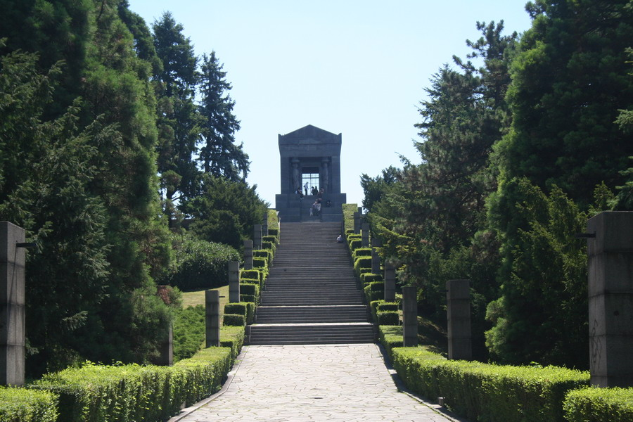 Avala.